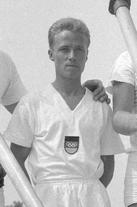 Europese roeikampioenschappen op de Bosbaan, Duitse twee met stuurman in actie